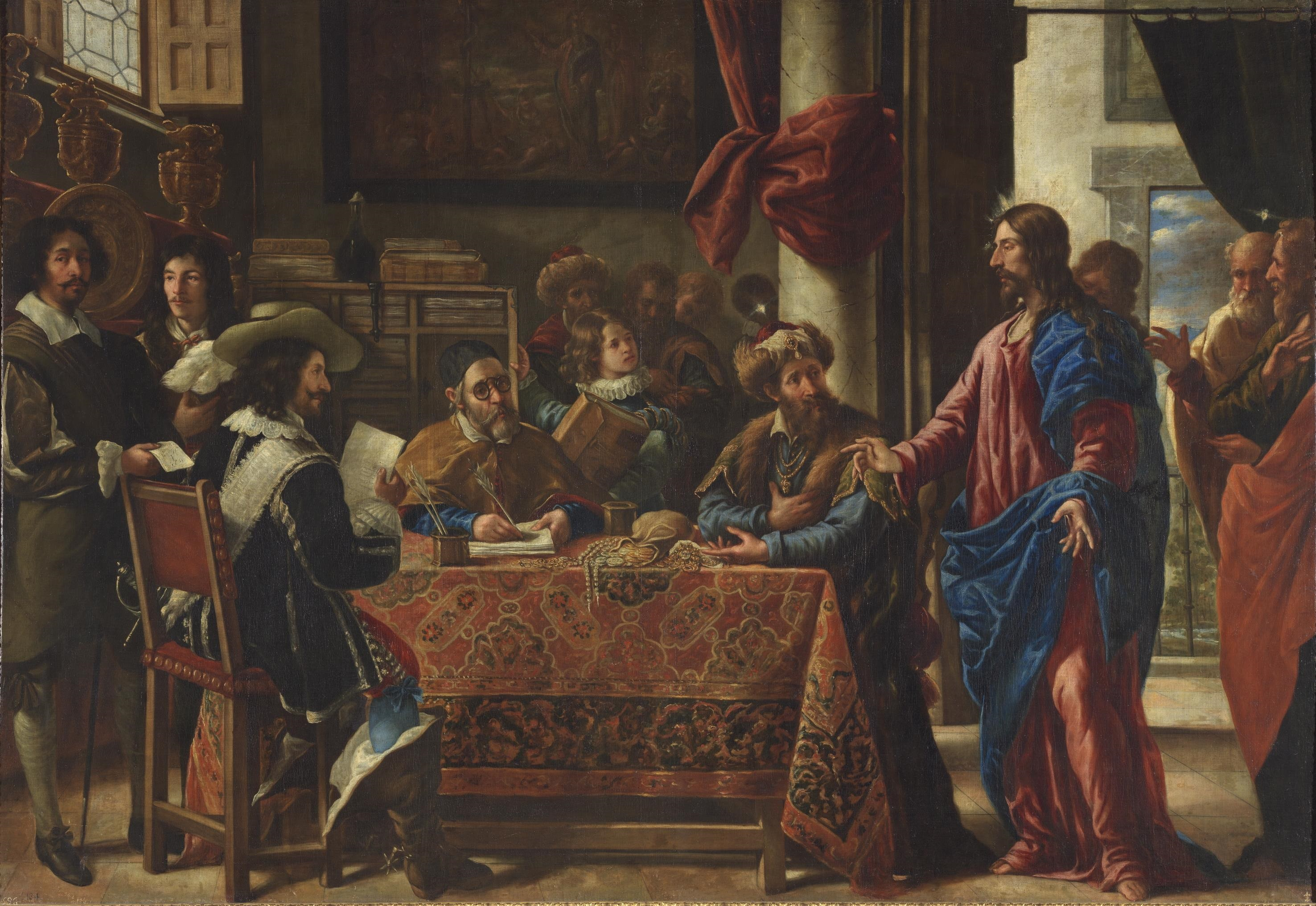 El lienzo representa el momento en que Jesucristo animó al publicano (recaudador de impuestos) Mateo, a que lo siguiera y pasara a ser uno de sus discípulos.